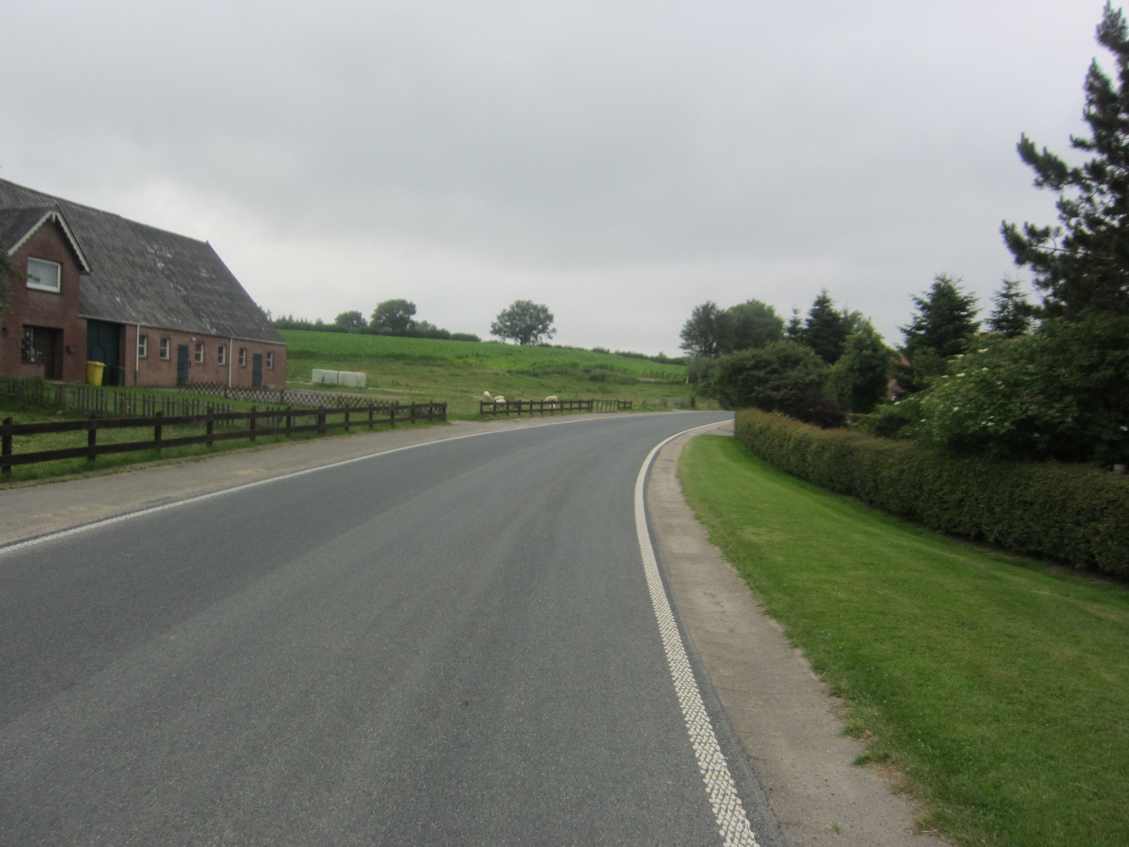 Straße "Dorfstraße" in Fresendelf